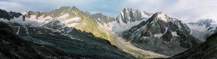 Panorama depuis le refuge du couvercle (Haute-Savoie, France)